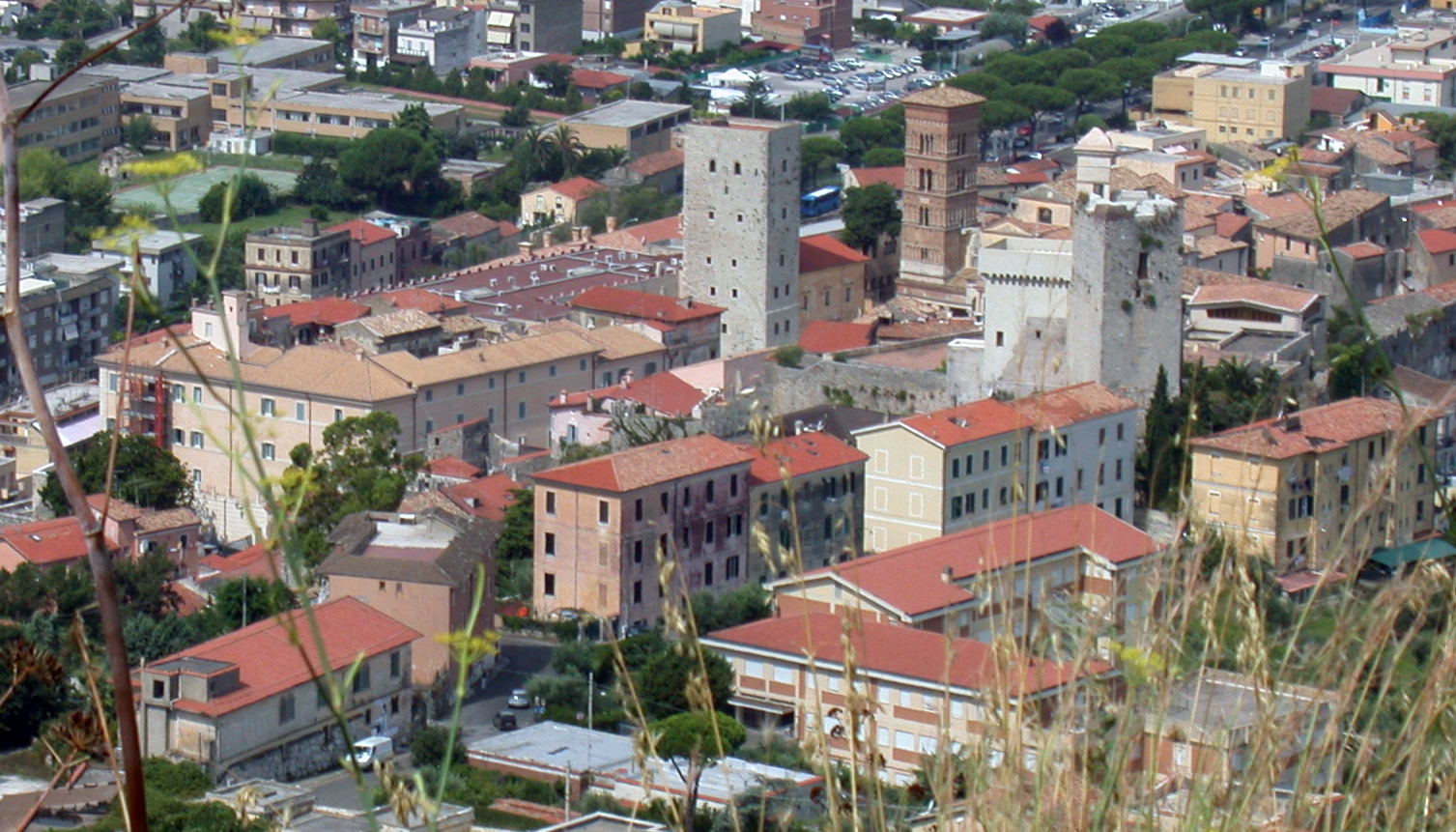 Terracina (provincia di Latina, Lazio, Italia), panorama della città alta dal tempio di Giove Anxur.